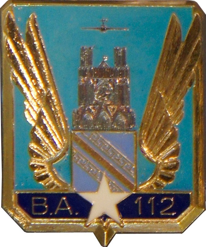 Objet présenté au Musée de l'aéronautique Bétheny, avec leur aimable autorisation de versement en ligne.